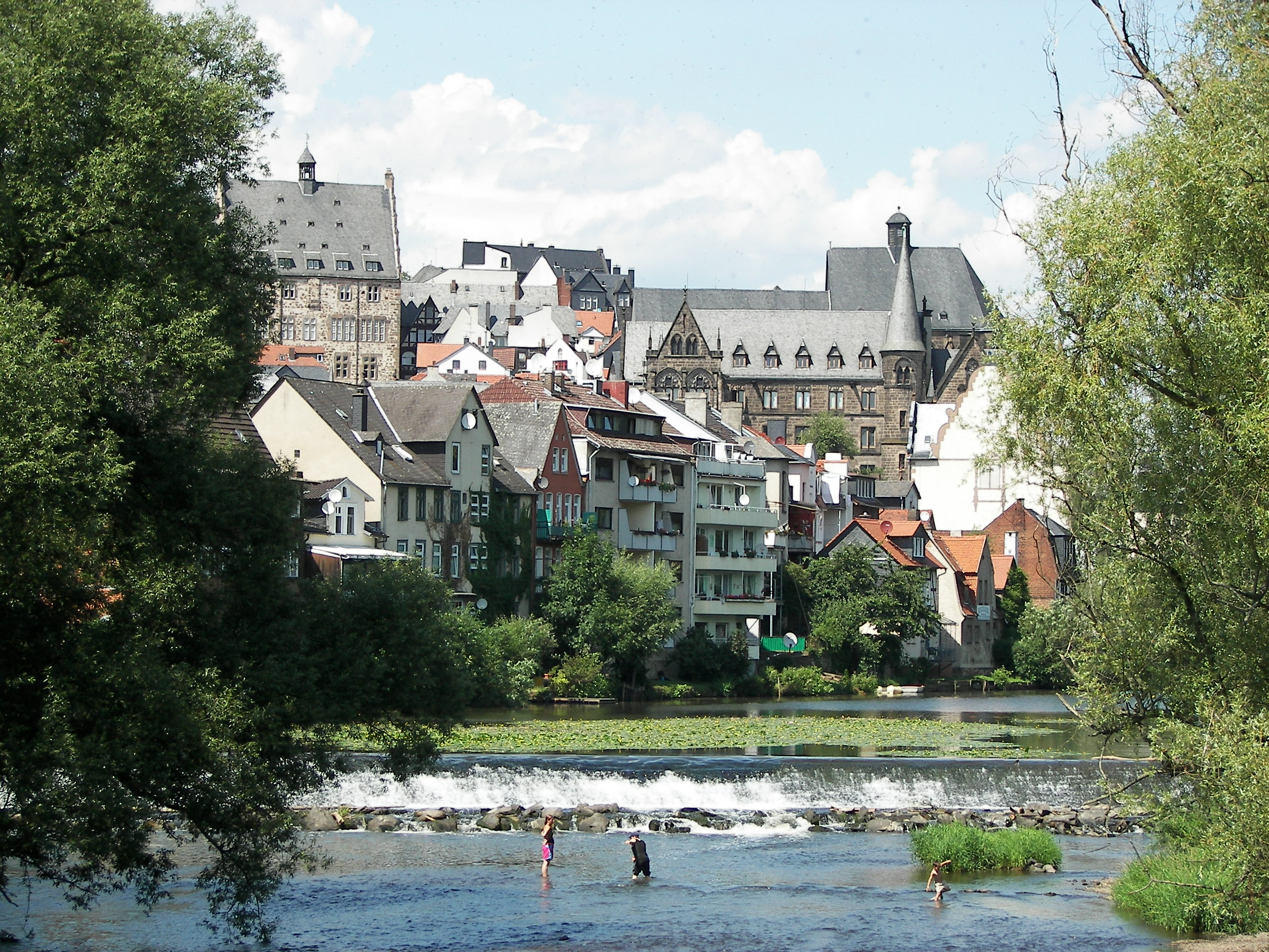 Lahn in Marburg, Weidenhäuser Wehr im Sommer mit Teichrosen im Oberwasser.